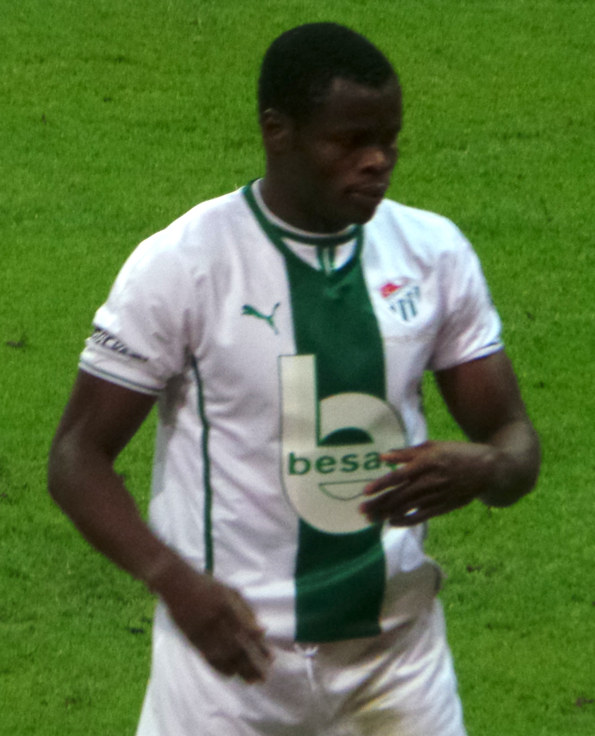 Taiwo with Bursaspor